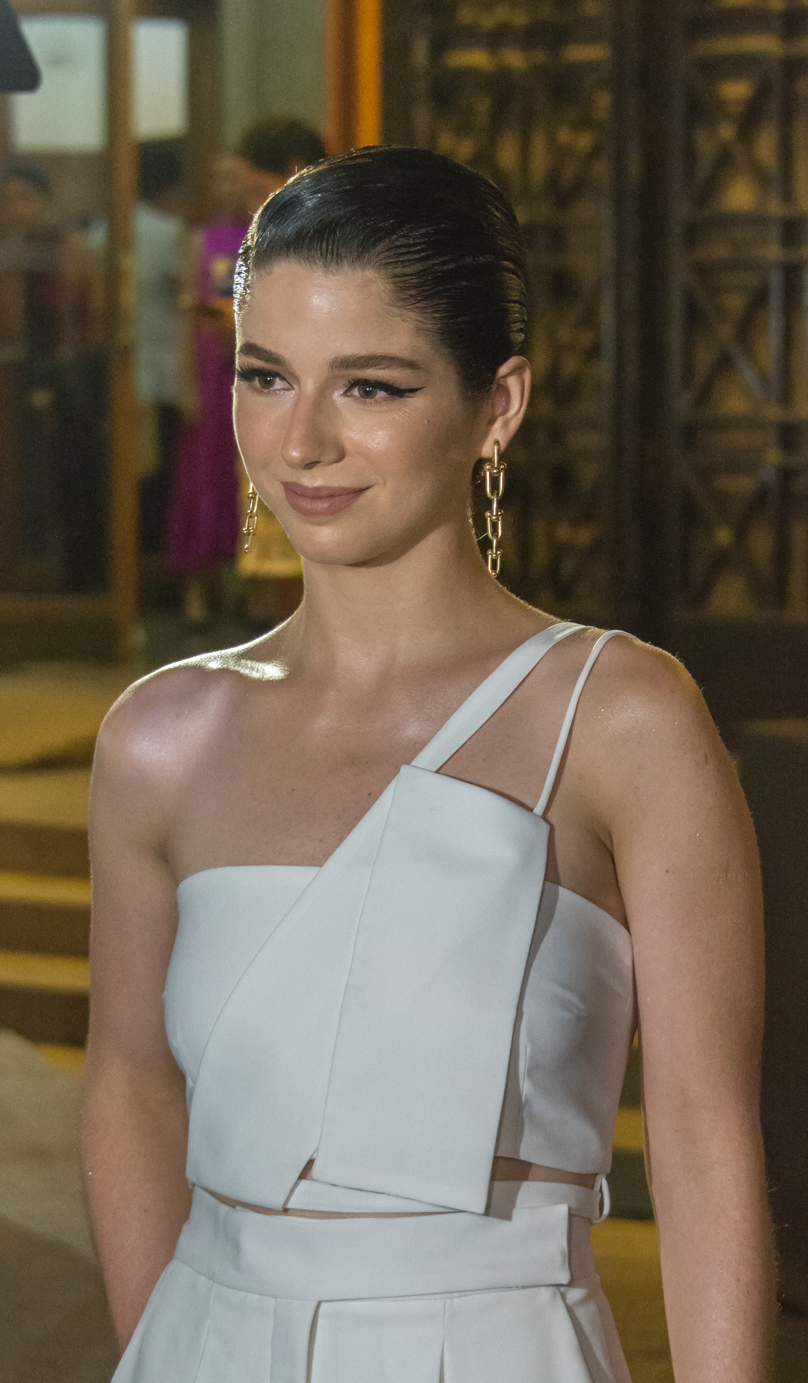 Mariana di Girolamo, Premios Caleuche, Teatro Oriente, Providencia, Santiago, Región Metropolitana de Santiago, Chile.